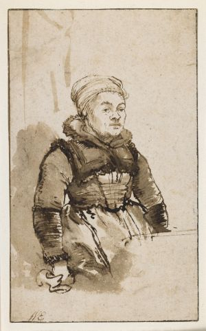 drawing by Rembrandt of Geertje Dircks